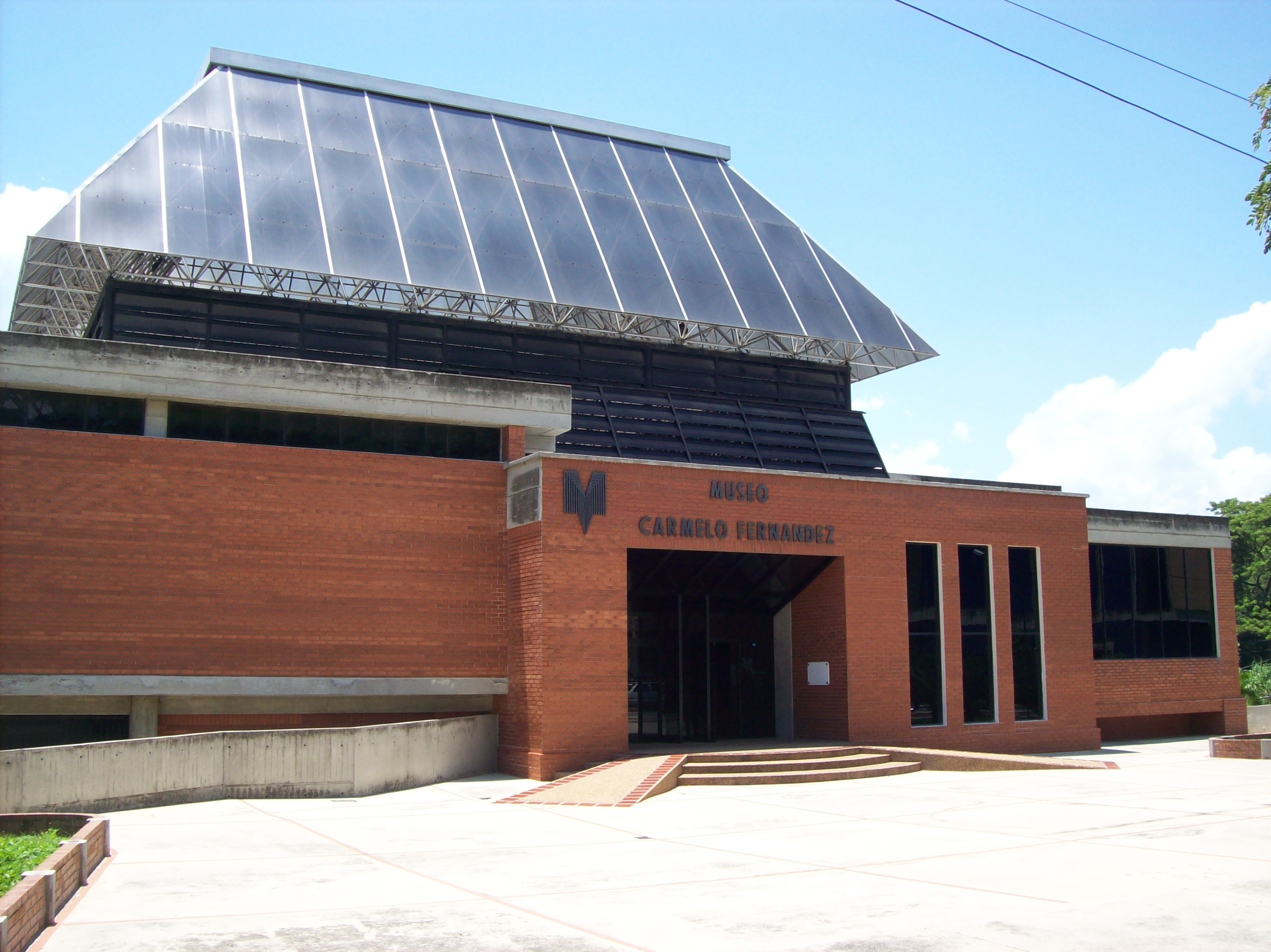 Sede del Museo Carmelo Fernández en el Complejo Cultural Andres Bello, San Felipe, estado Yaracuy. Venezuela